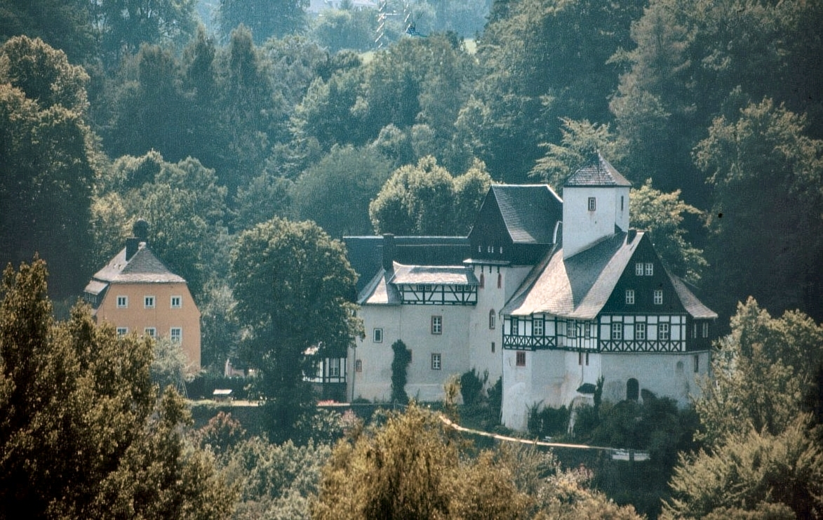 Burg Rauenstein bei Lengefeld, Deutschland